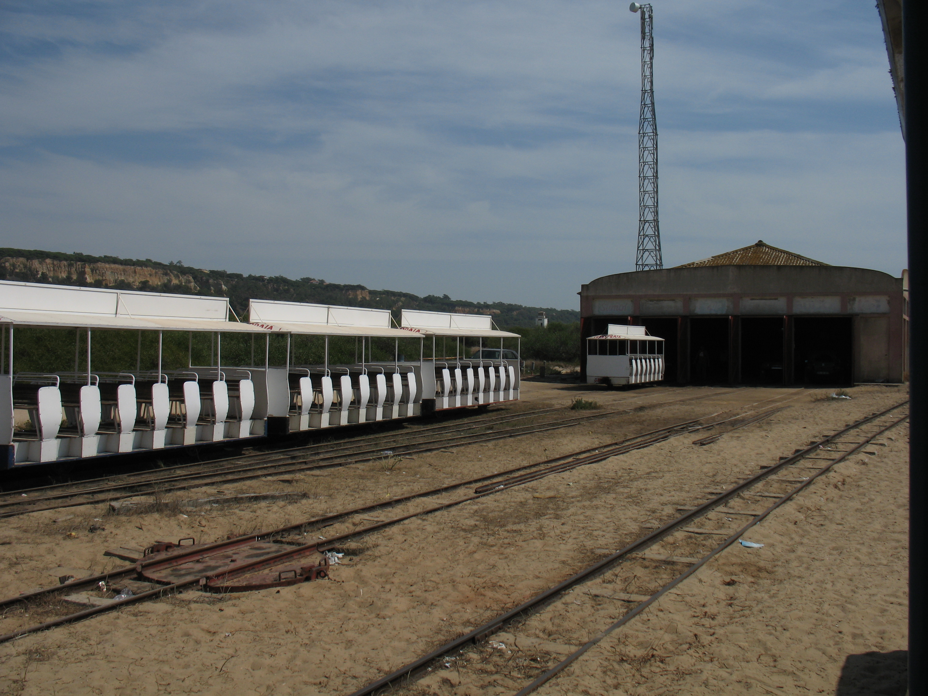 At Caparica.